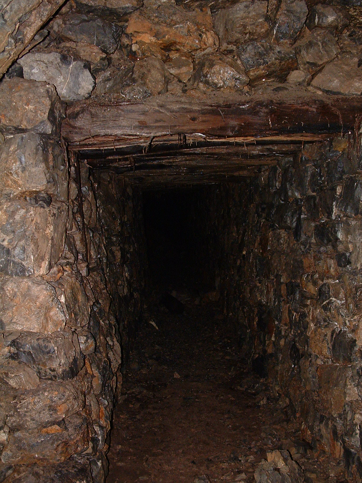 Miniere di Gorno, Bergamo, Italia